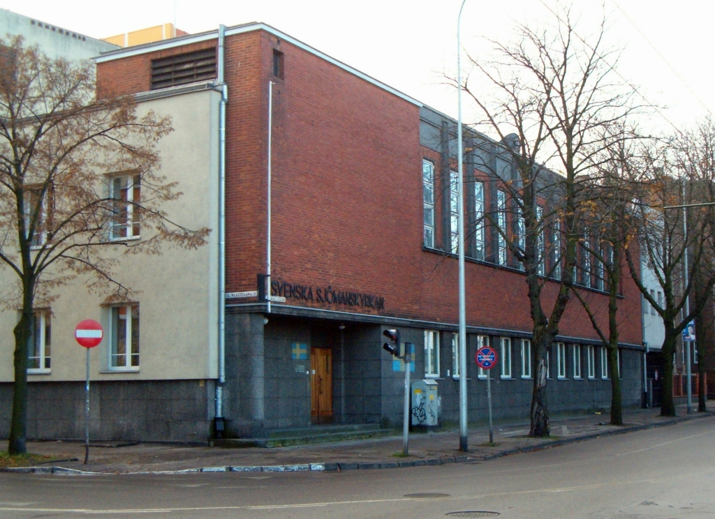 Gdynia Śródmieście, ul. Jana z Kolna 25 - Dom Marynarza Szwedzkiego (Konsulat Królestwa Szwecji w Gdyni), 1936.